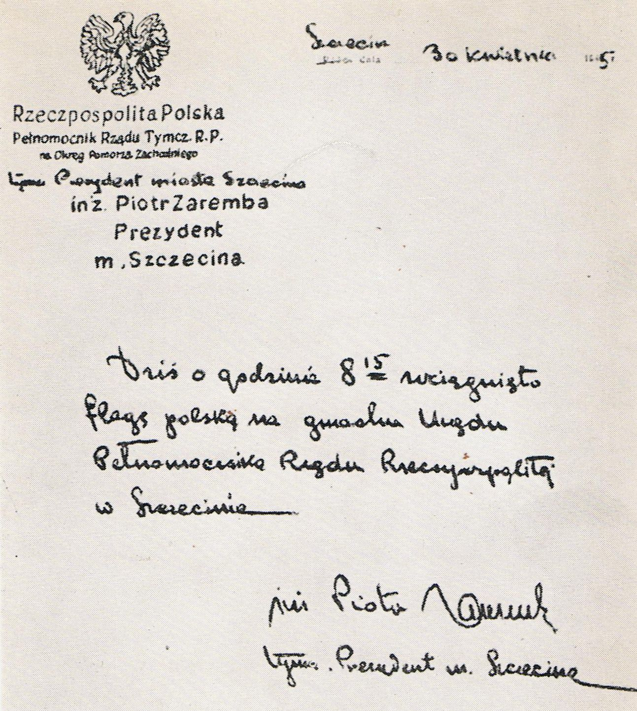 Fotokopia notatki sporządzonej przez Piotra Zarembę o wywieszeniu polskiej flagi w dniu 30.04.1945